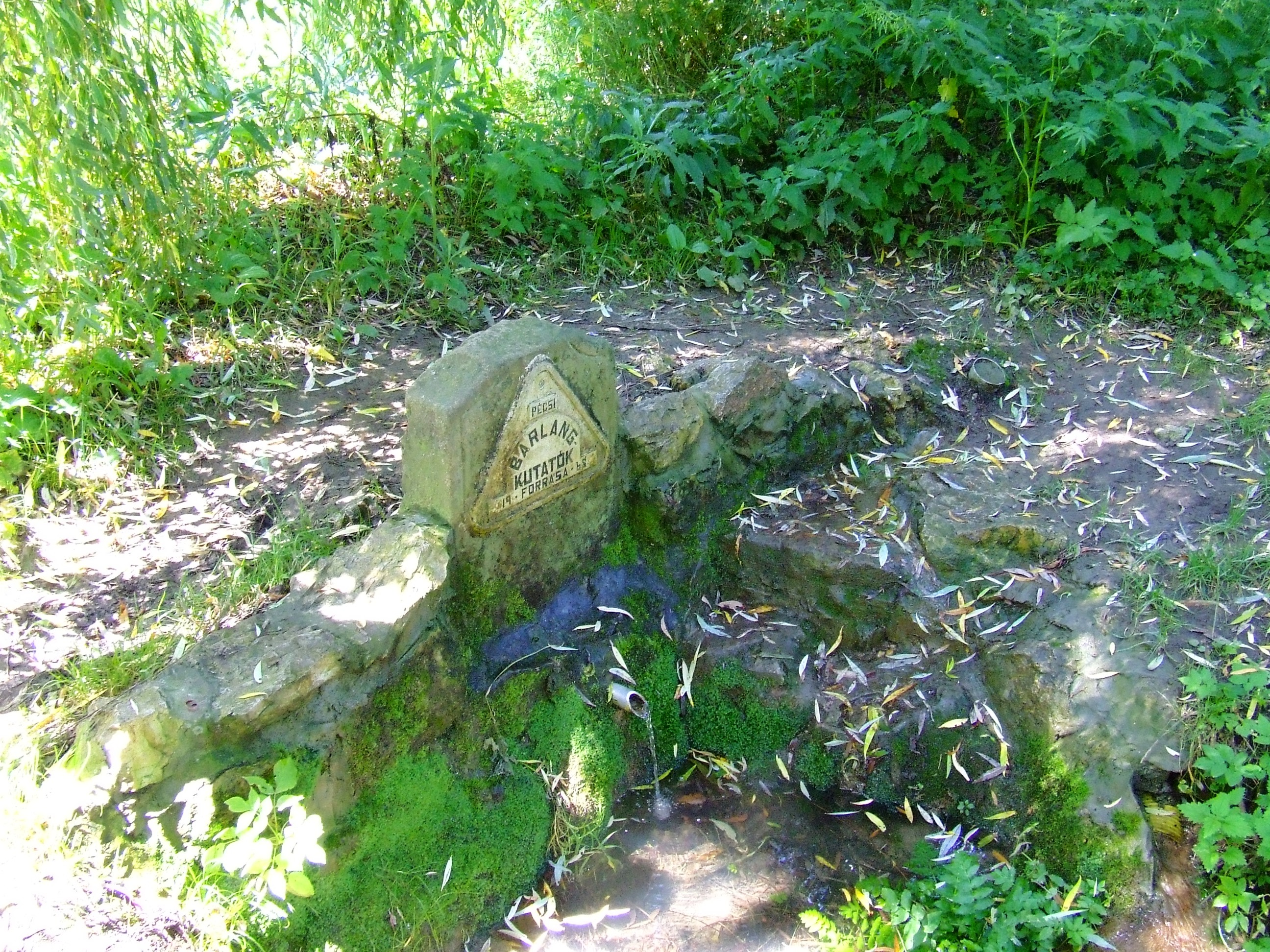 A Pécsi barlangkutatók forrása Orfűn a Vízfő-forrás közelében